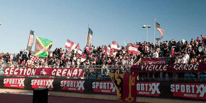 Fans Servette FC against Lausanne-Sport